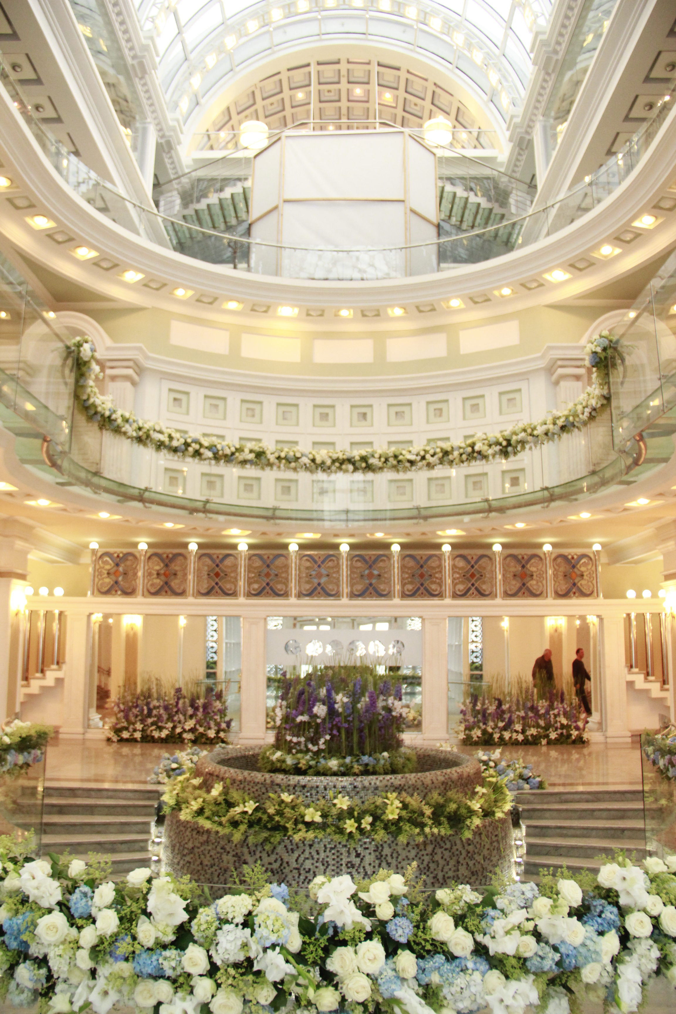 Хол Батумского Государственного Музыкального Центра